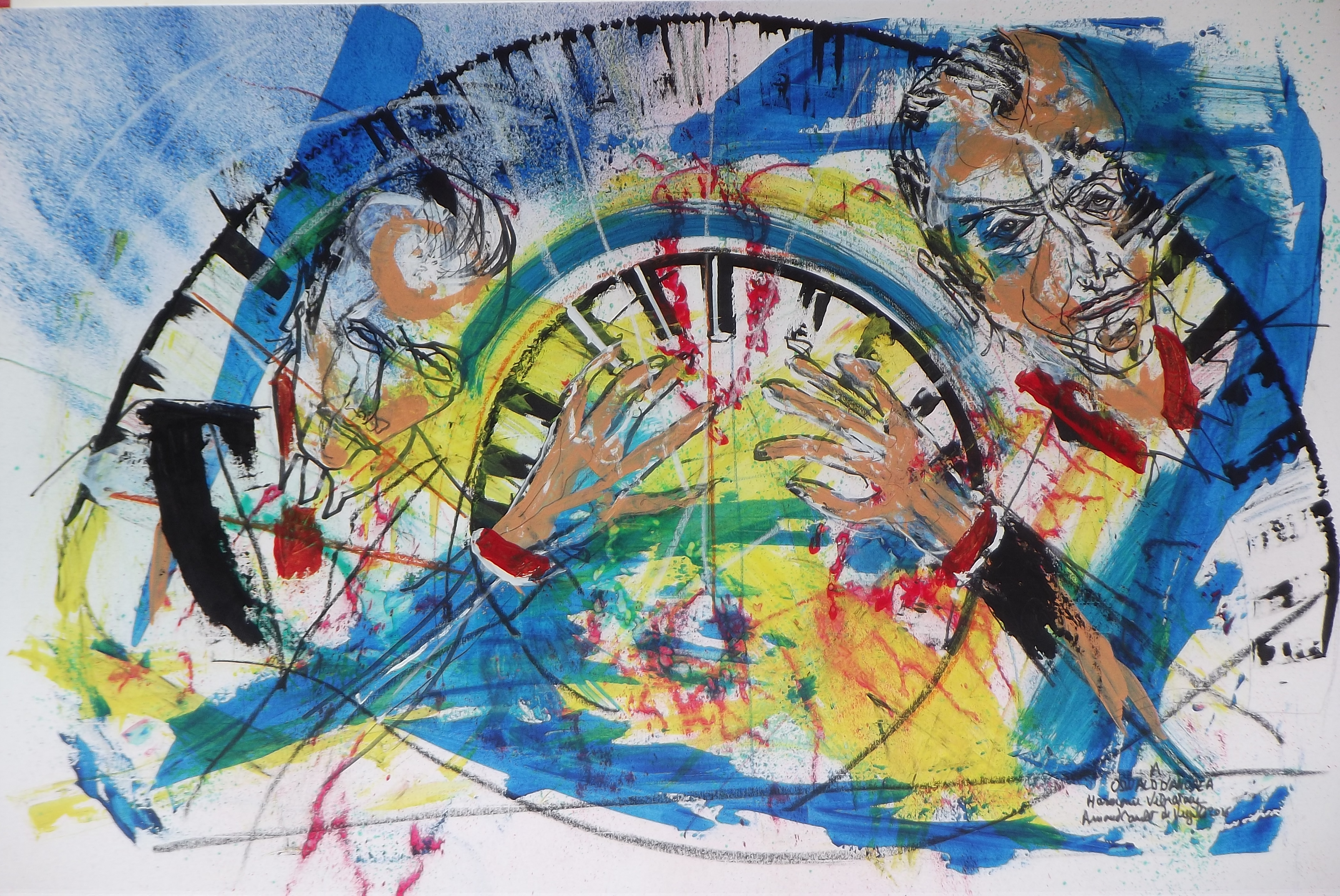 Arnaud de Vregille, A Oswald d'Andréa Harmonie Vibratoire